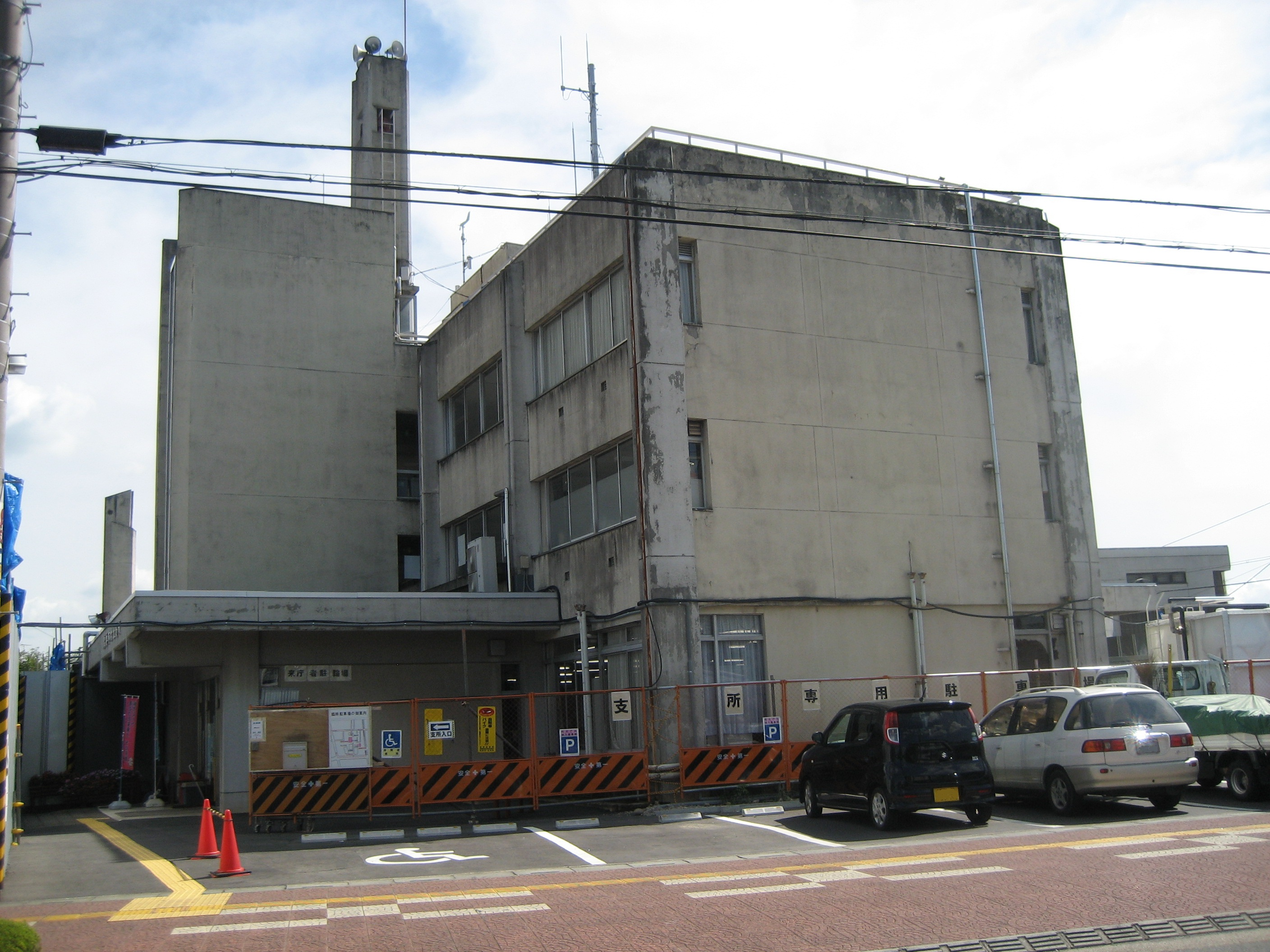 鴻巣市役所吹上支所（旧吹上町役場）（西側の道路から撮影）